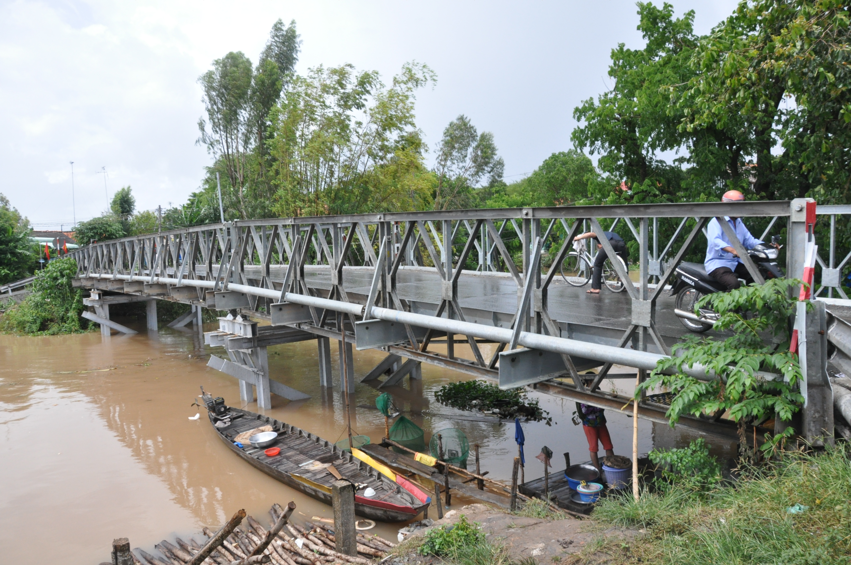 Cau xa Chau Phong,Tan chau -an giang